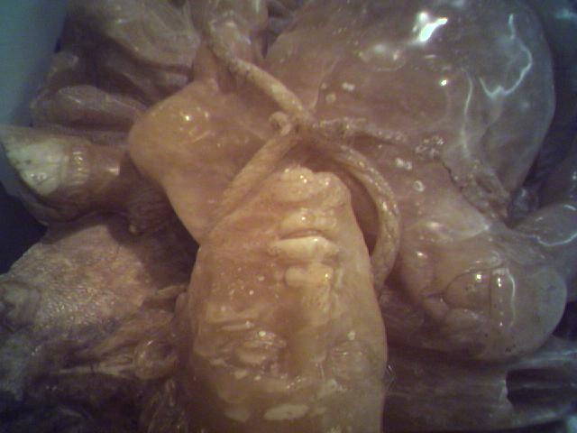 San Vicente arrojado al muladar - Escultura del Museo de Bellas Artes de Valencia